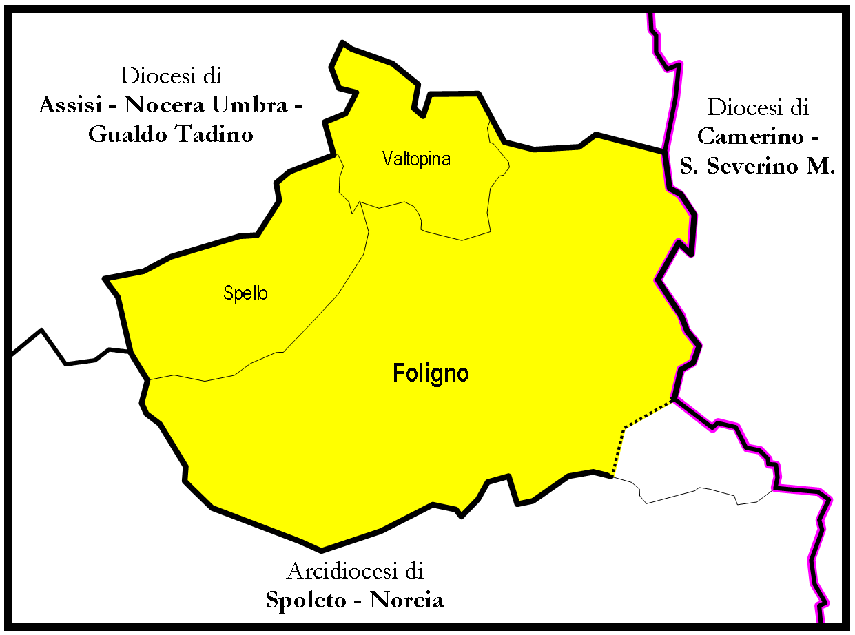 Mappa Diocesi di Foligno